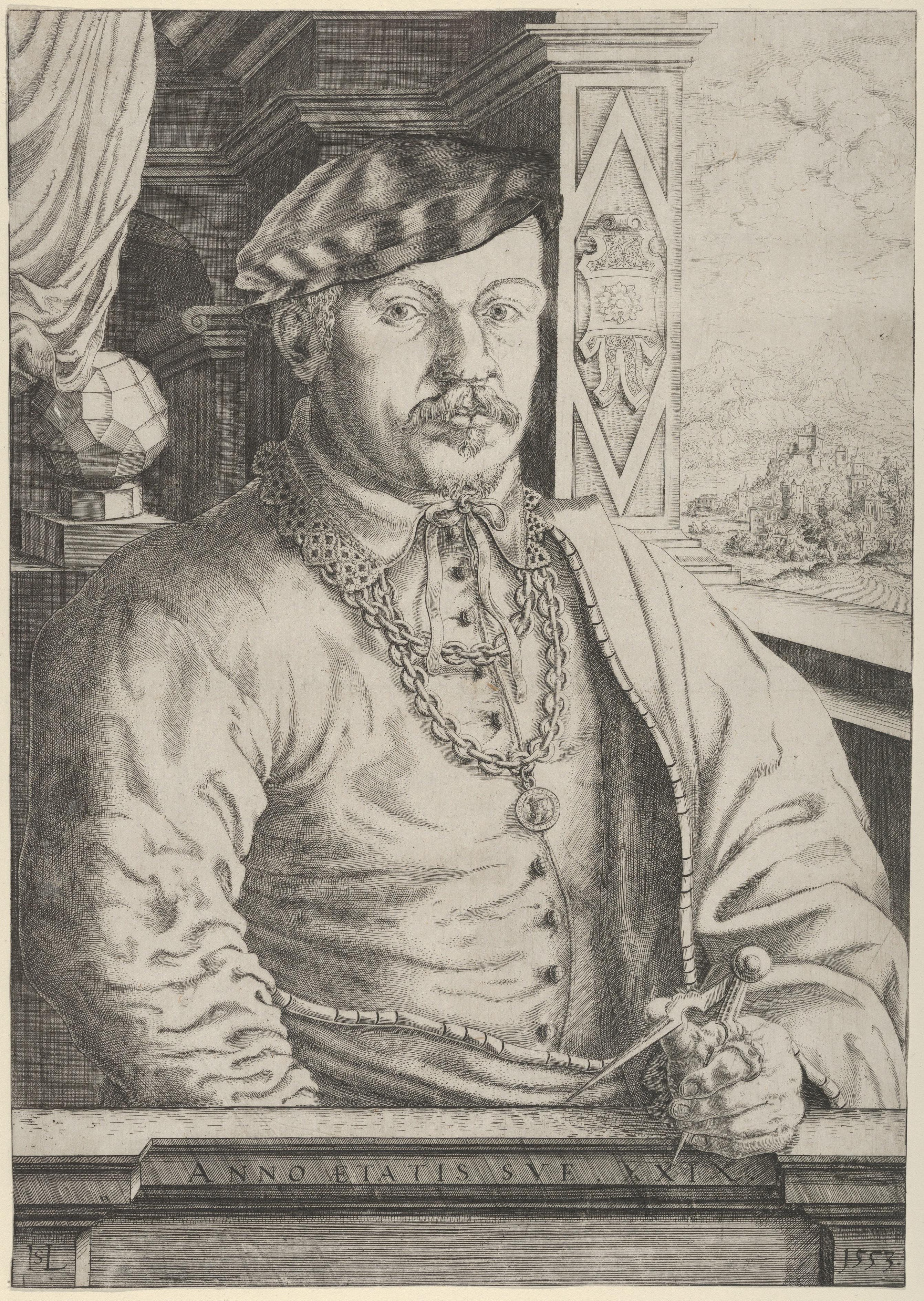 Print